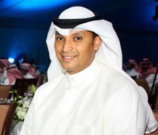 Jasem Al Huwaidi.